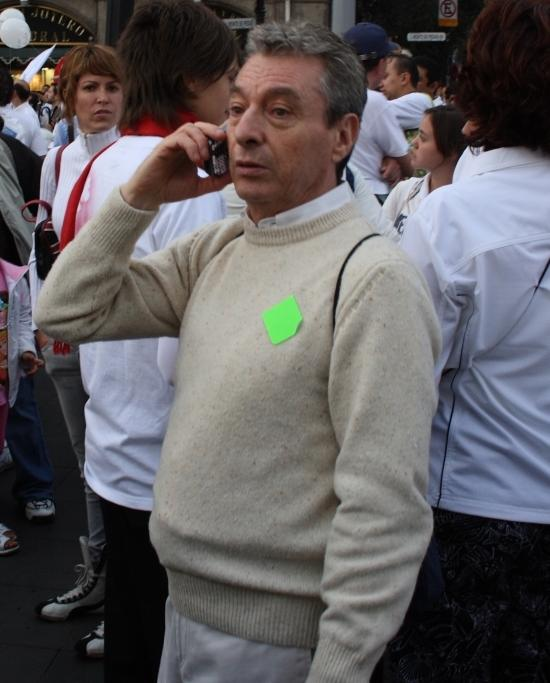 Cesar Costa, Mexican rock star. In